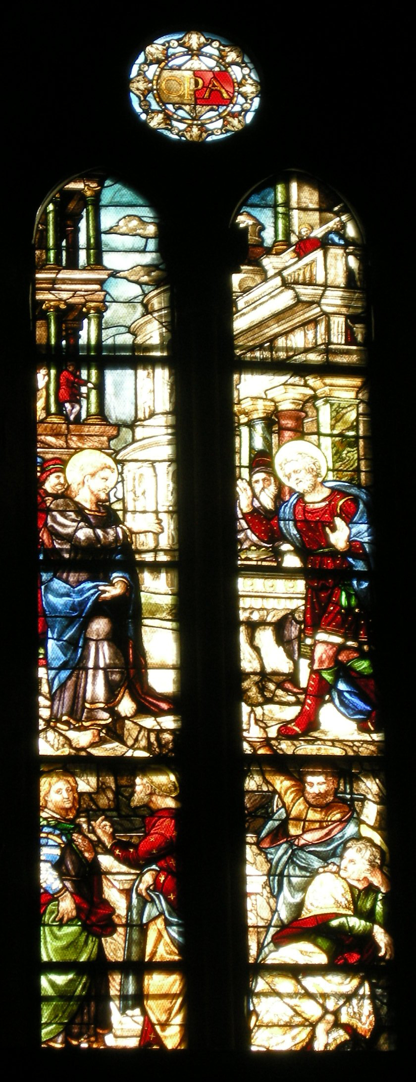 Duomo di arezzo, interno, vetrate di guillaume de marcillat 01, vocazione di san matteo 1519-1521